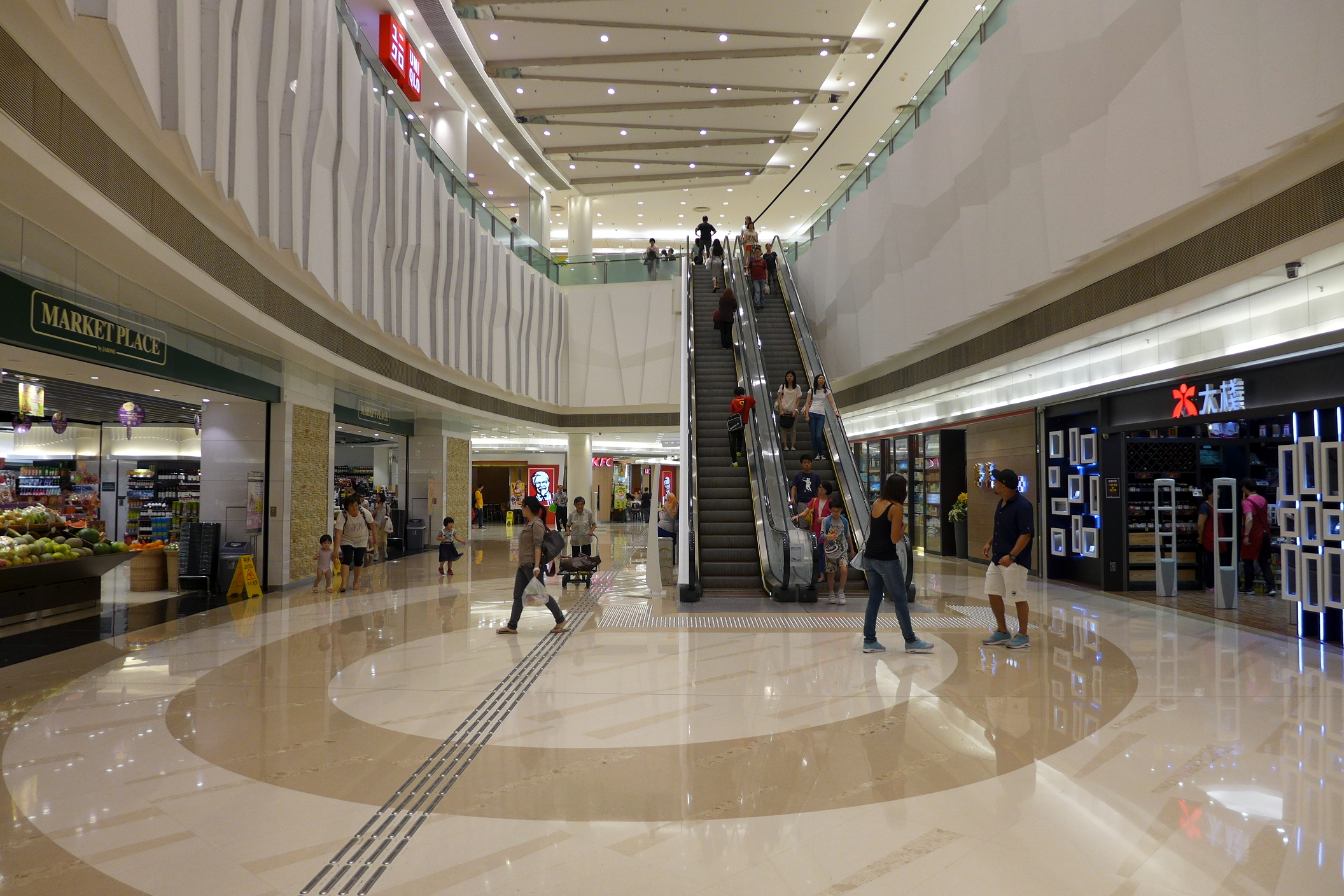 PopCorn2 Void